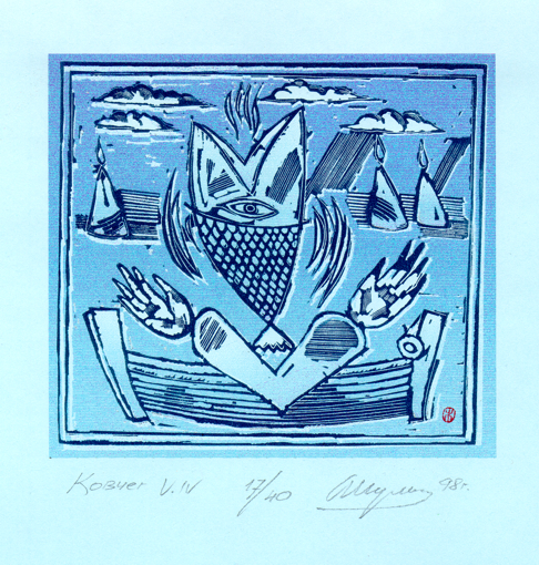 Serge Lachinov (aLexej von Schultz). Arl V.IV. Woodcut. 1998